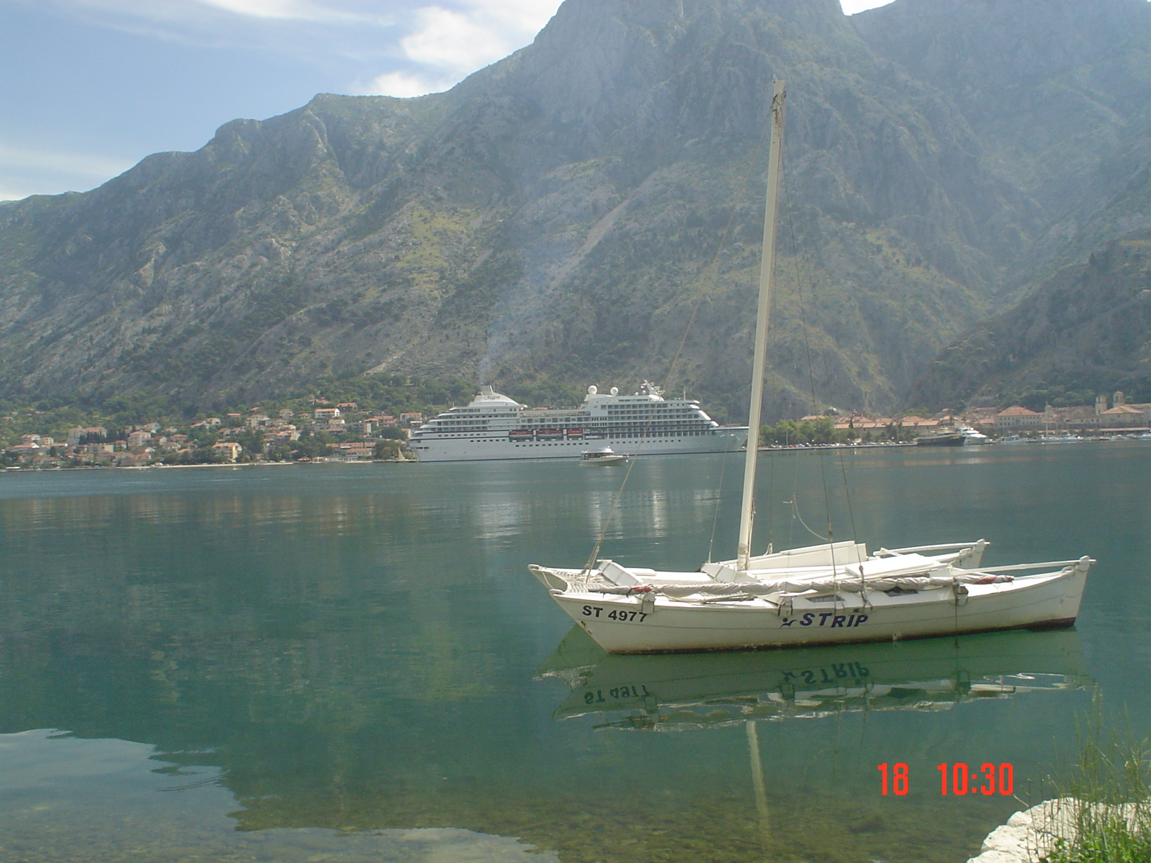 Kostanjica, Montenegro